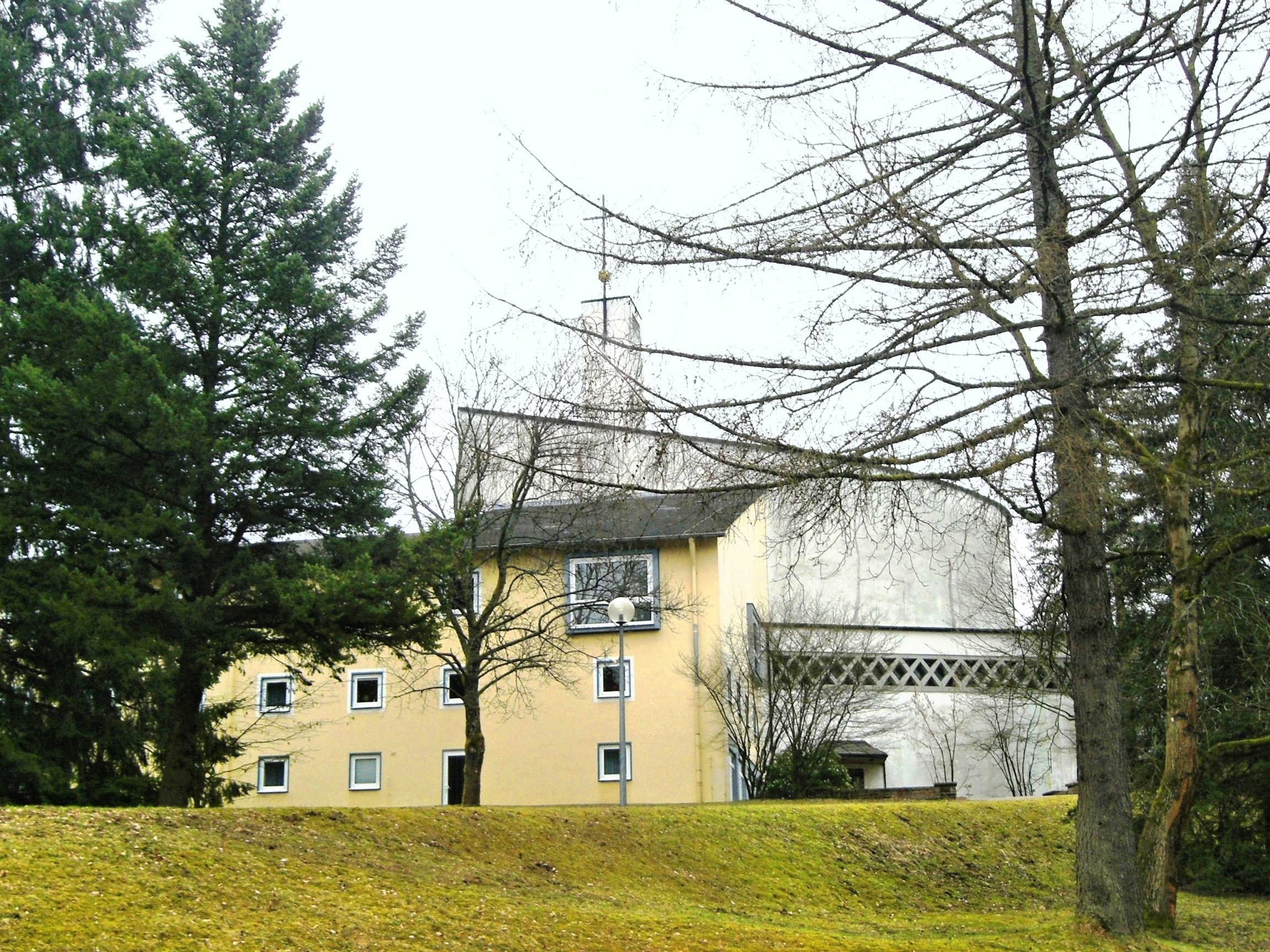 Im Jahr 1957/58 errichtete Klosterkirche Maria Königin bei Altenhundem